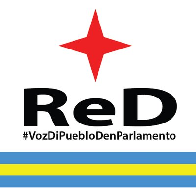 Logo van de politieke partij RED van Aruba